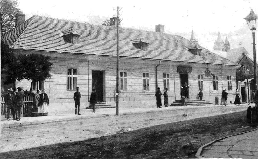 Apteka w Sanoku przy ul. Kościuszki. W przeszłości właścicielami byli Jan Zarewicz, Feliks Giela, Marian Kawski. Budynek istniał do 1963.